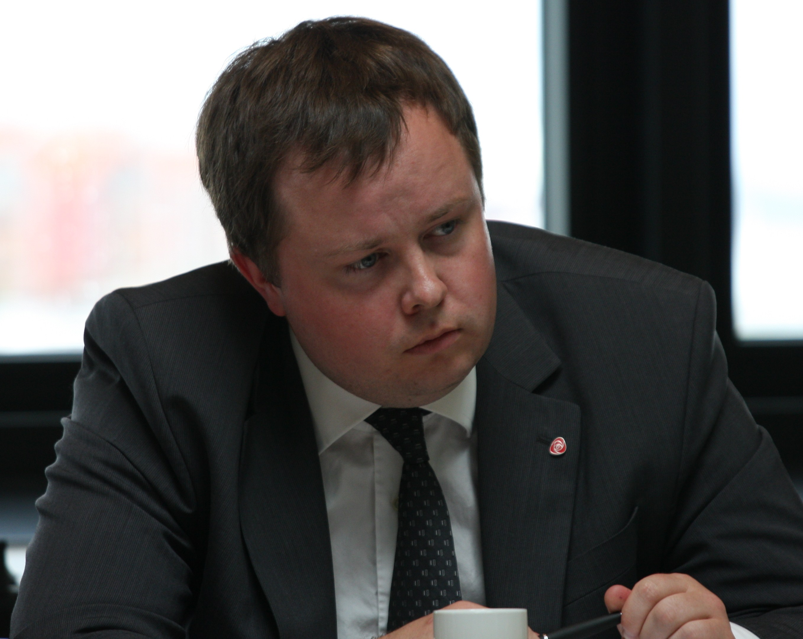 Robin Kåss